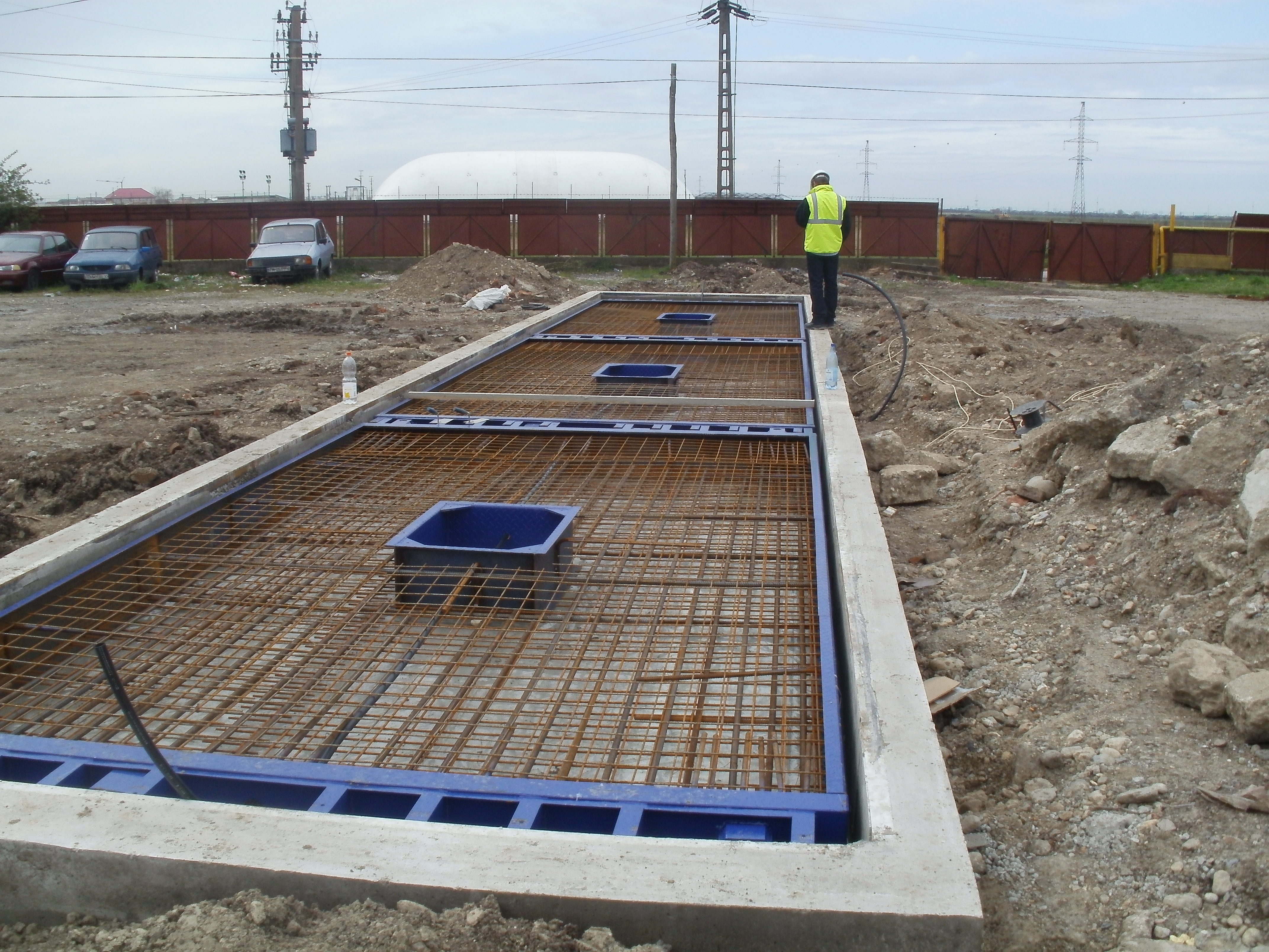 Armare cantar auto beton cu turnare la fata locului